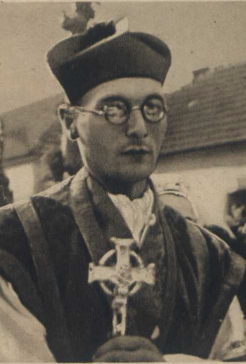 Pavol Ušák Oliva - slovenský básnik katolíckej moderny, rímskokatolícky kňaz